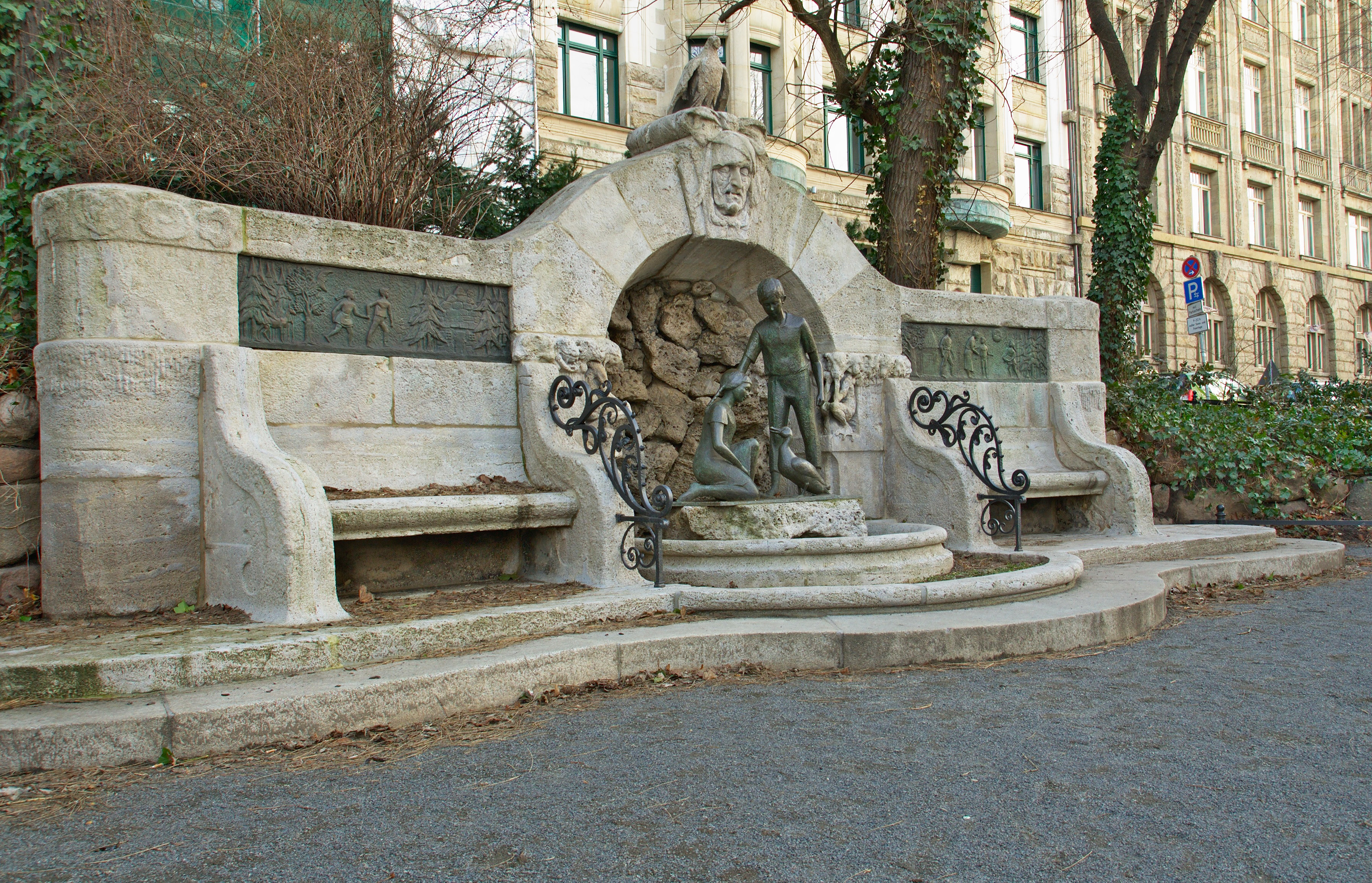 Märchenbrunnen, Leipzig 2011.